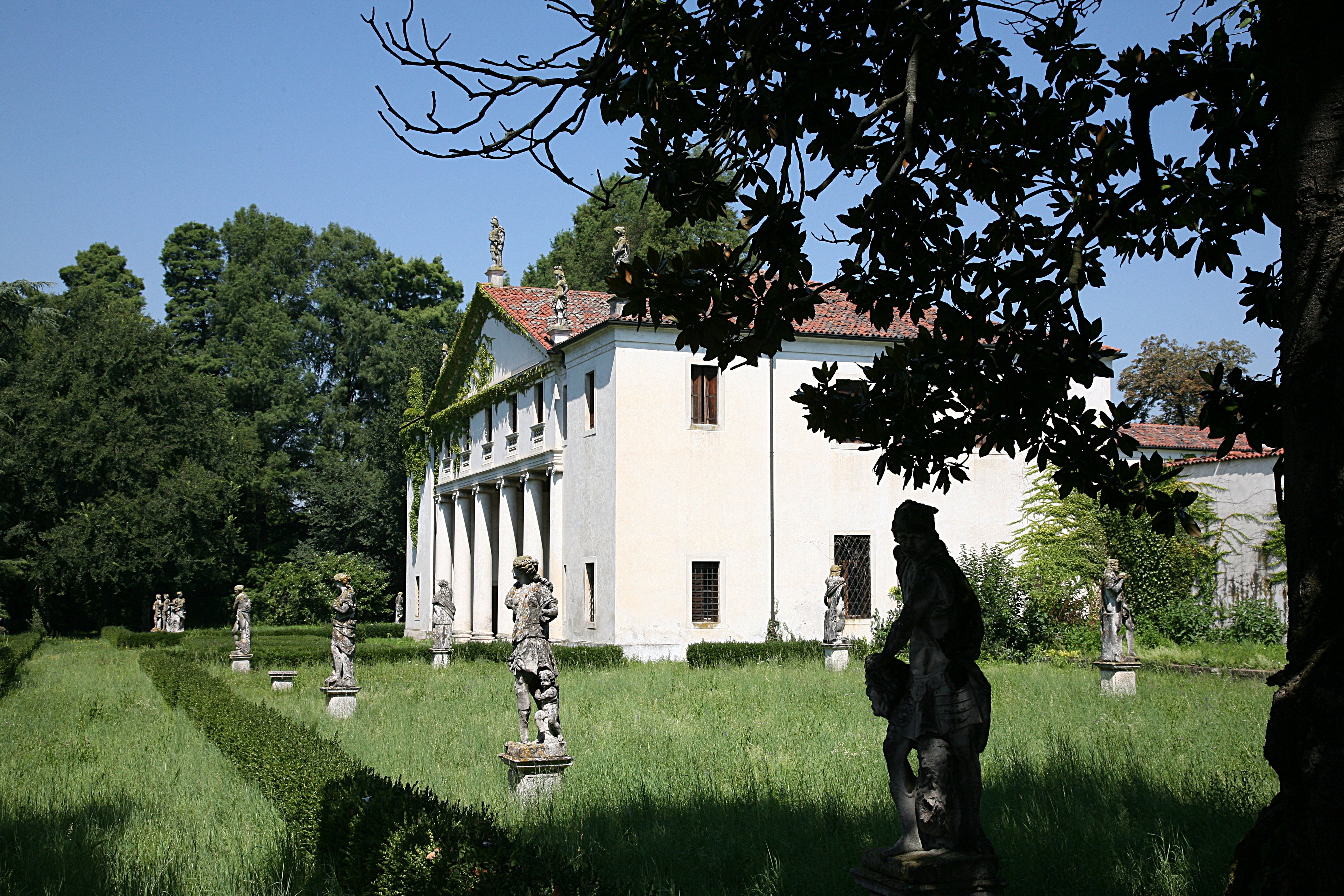 Villa Valmarana Scagnolari Zen - A villa in Bolzano Vicentino just outside Vicenza - by Andrea Palladio.